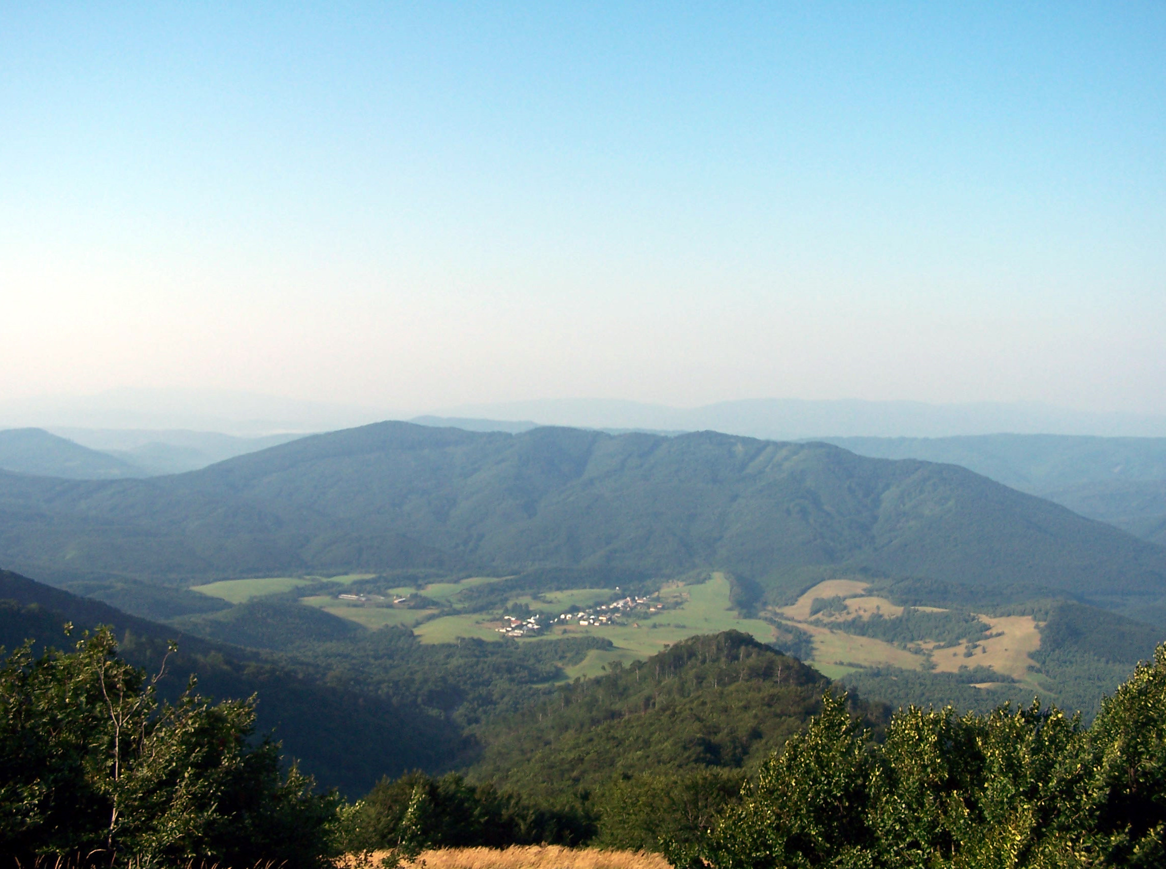 Runina vilage from Saddle under Durkovec.JPG